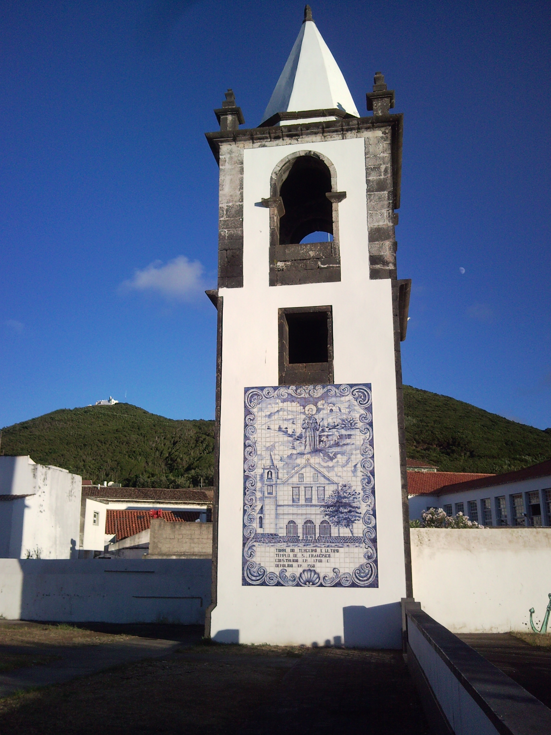 Torre da Igreja de Nossa Senhora dos Anjos, (S. Francisco). Portugal, Açores, Ilha Graciosa, (ant. distrito de Angra do Heroismo), Santa Cruz da Graciosa.